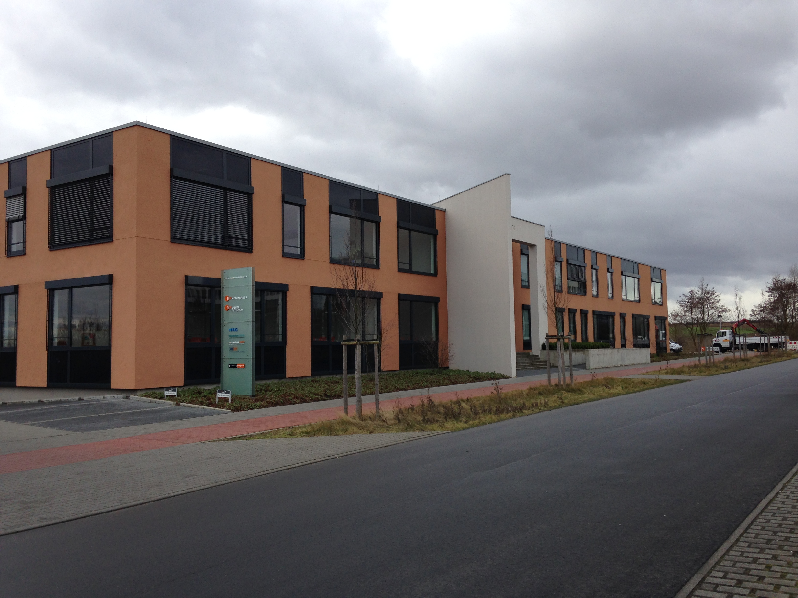 ZDF Enterprise